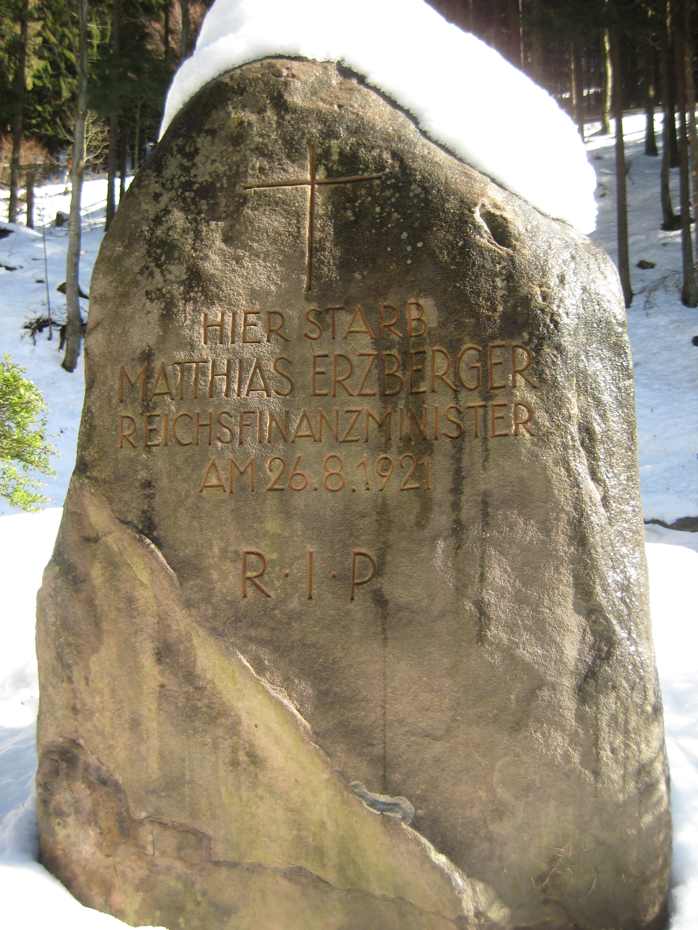 Gedenkstein für Matthias Erzberger an der B28 bei Bad Griesbach im Schwarzwald (Winteraufnahme)